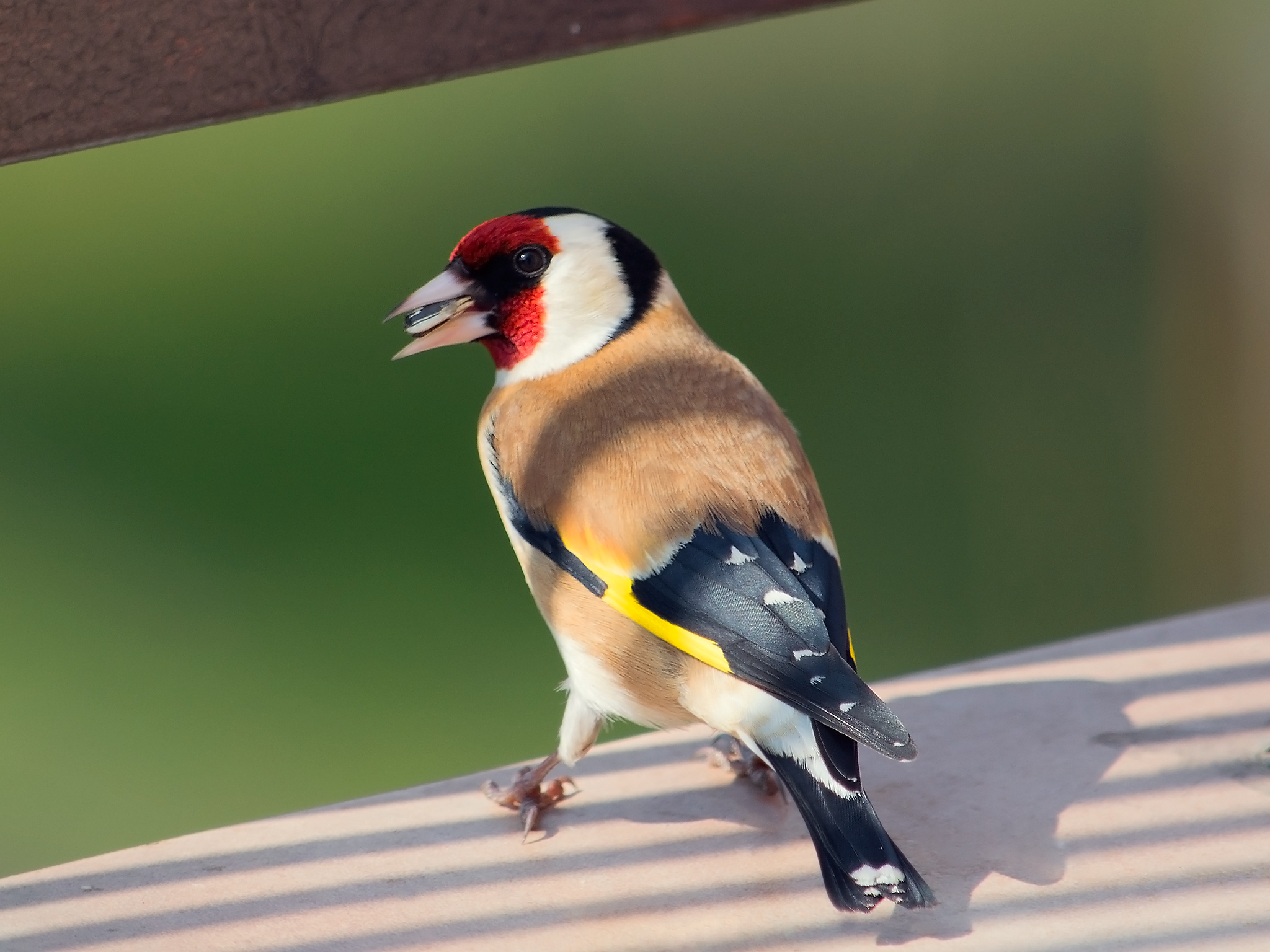 Szerző: Hrabovszki Ervin Készítés helyszíne: Szeged Készítés dátuma: 2016. 03. 21. Fényképezőgép típusa: NIKON D5200 Érzékenység: ISO-252 F-stop: f/5.6 Expozíciós idő: 1/640 s Fókusztávolság: 300 mm